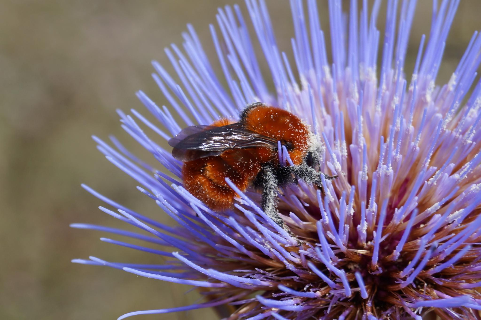 Bombus dahlbomii en cardón (Cynara cardunculus). Quebrada El Canelo, 2 km al sur de Los Vilos, Chile.